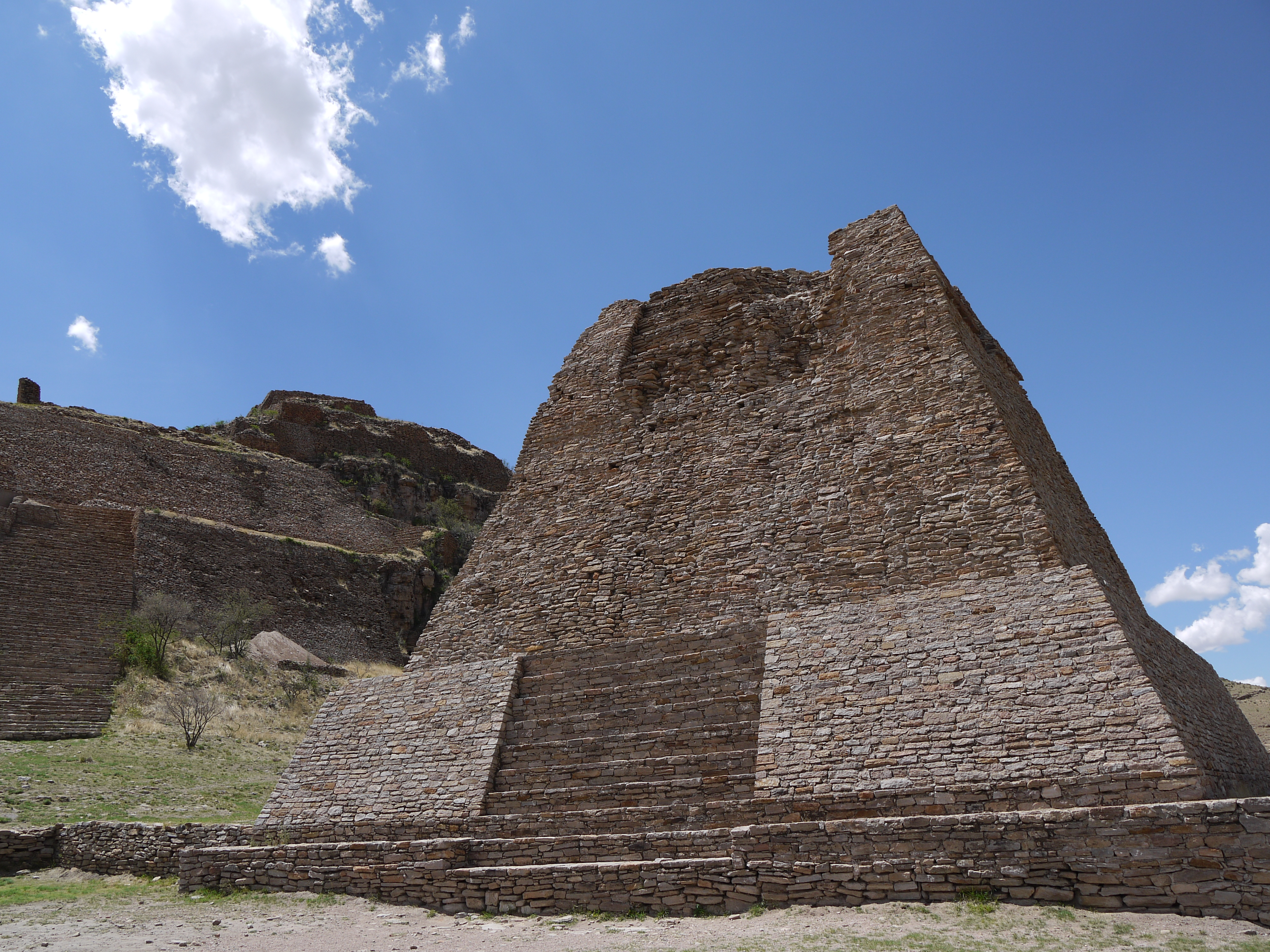 La Quemada, Pirámide Votiva